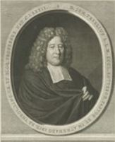 Portrait de Johannes Texelius pasteur et professeur de philosophie à l'école illustre de Rotterdam.